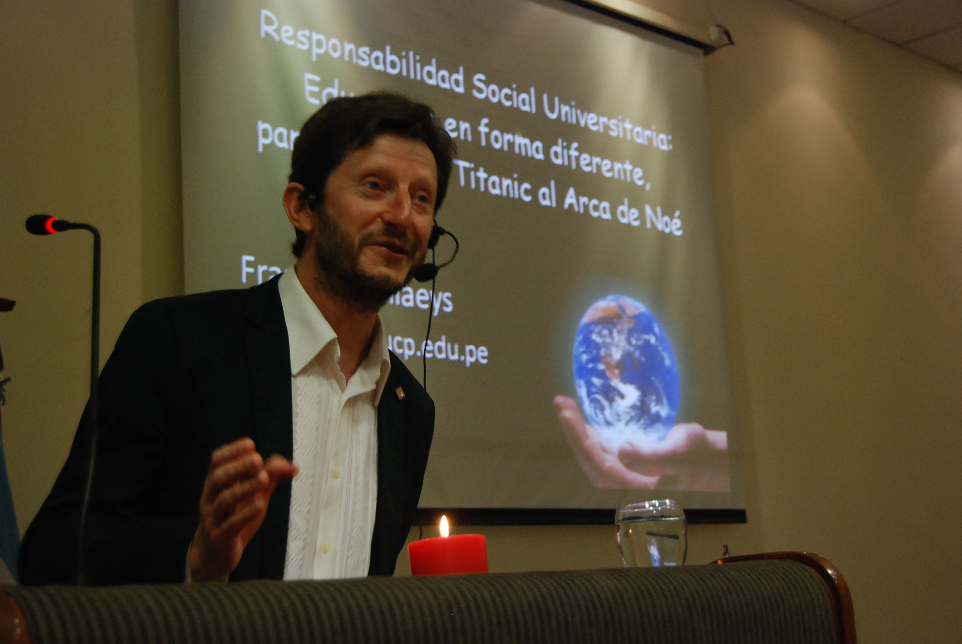 Dr. François Valleys Asesor experto de ORSALC – UNESCO en la Semana de la Ingeniería